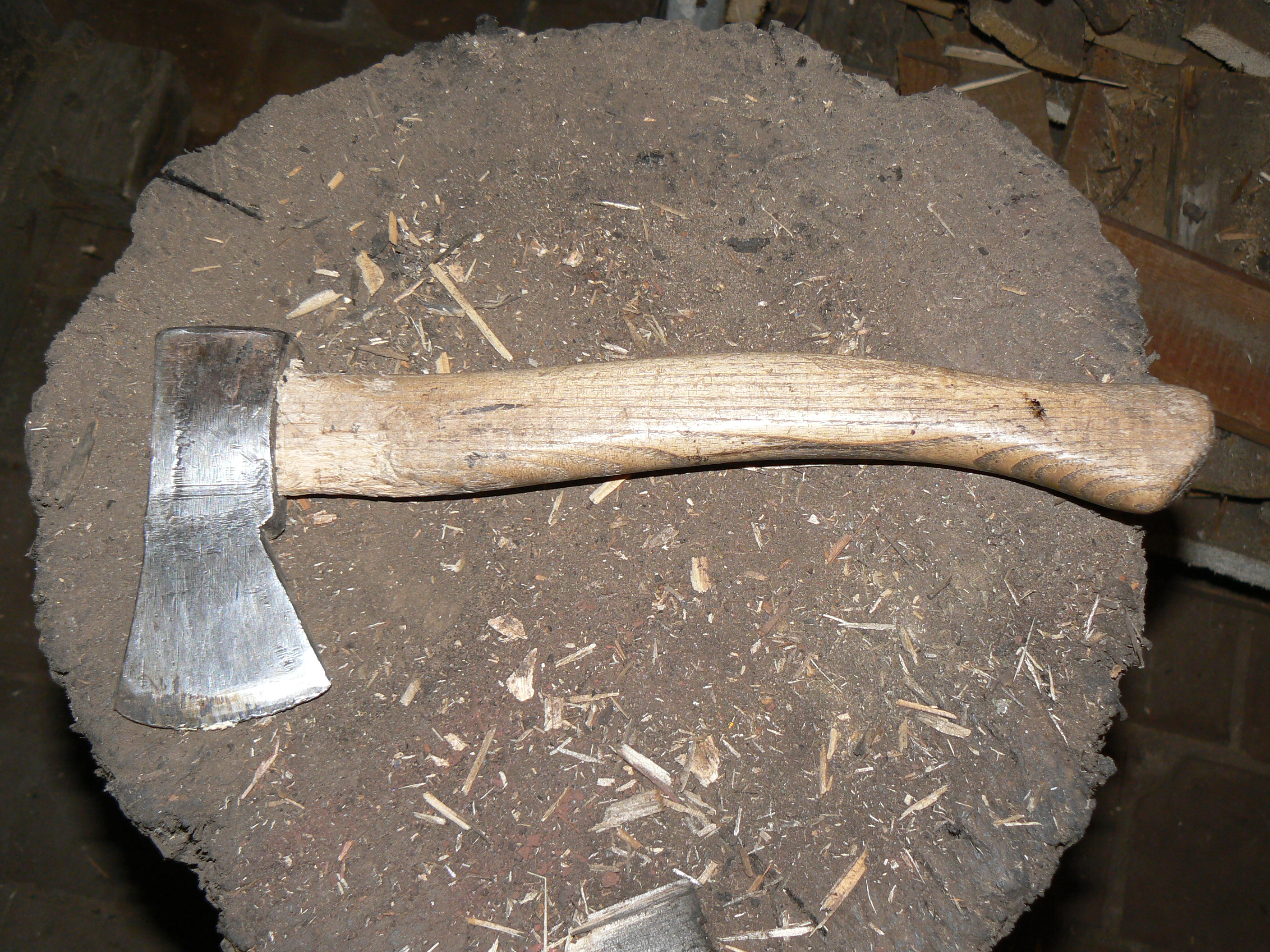 Hachette